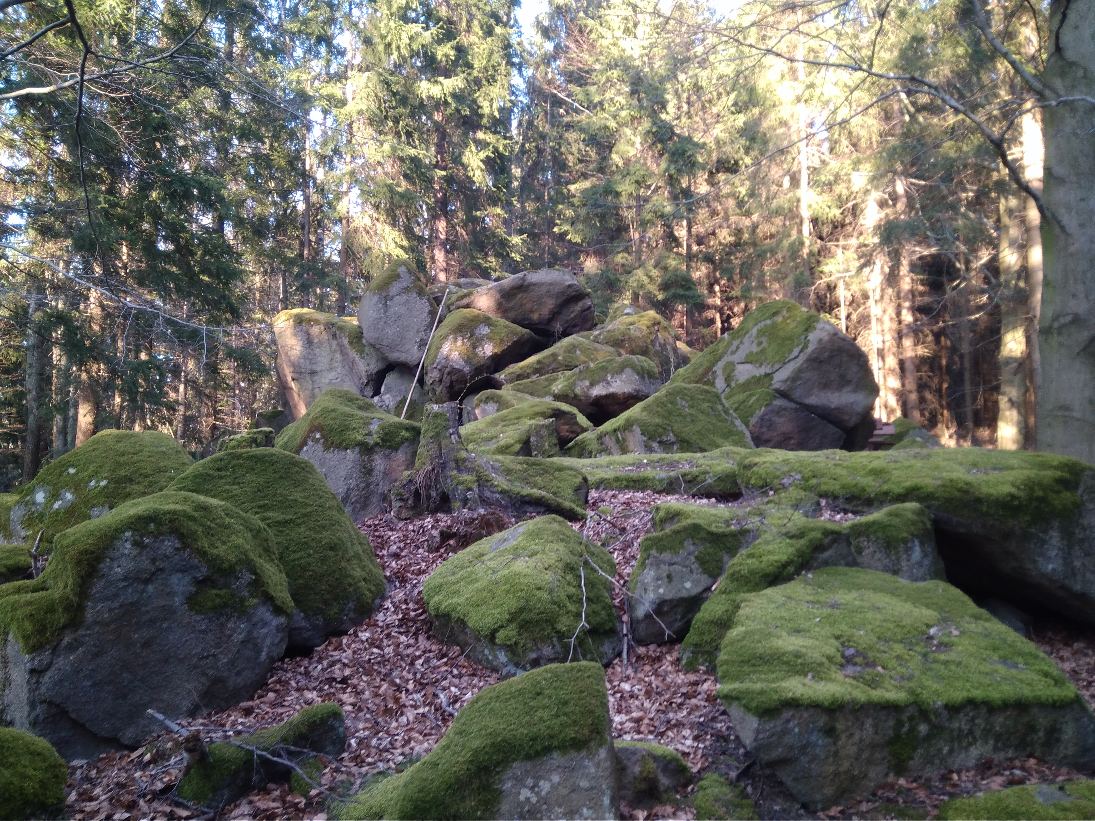 Wolfstein v Sebnitzkém lese